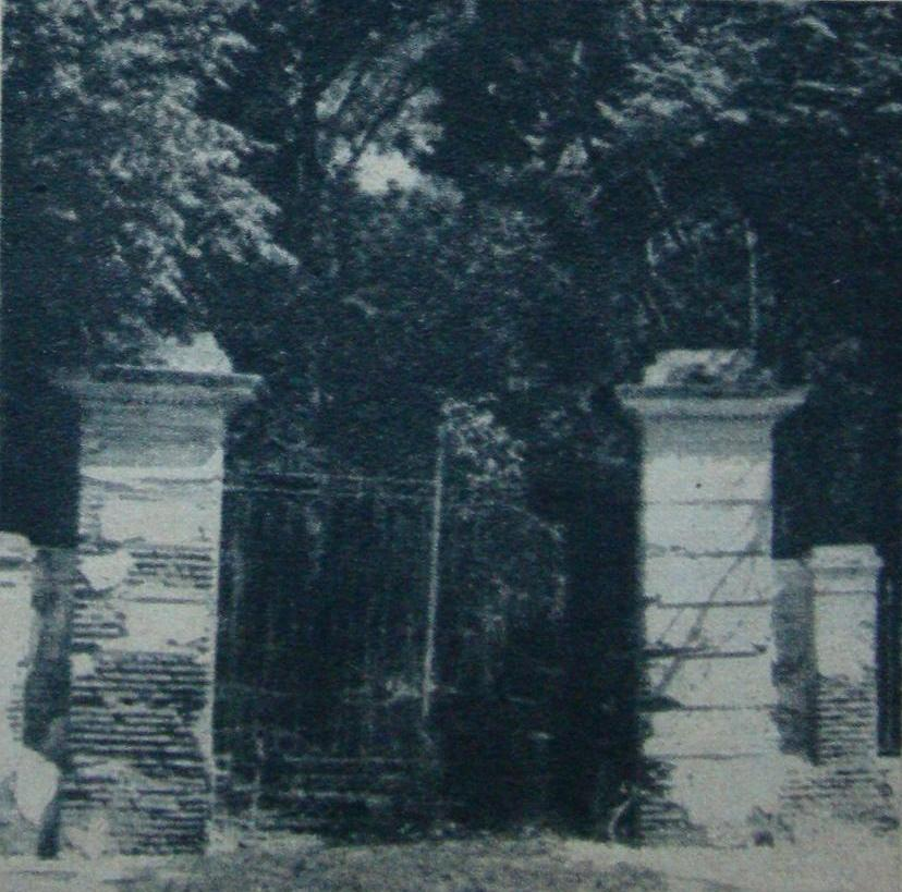 Ruinas del portón de acceso a la antigua Quinta de Lezica, construida en la década de 1860 por don Ambrosio Plácido de Lezica, y demolida en 1927 para construir el actual Parque Rivadavia, del barrio de Caballito. Buenos Aires, Argentina.